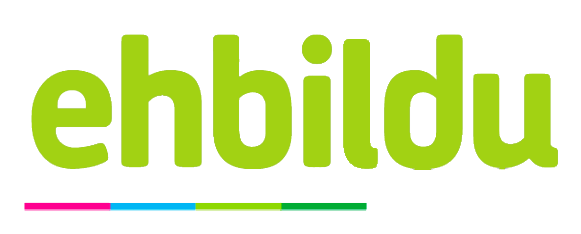 Euskal Herria Bildu alderdiaren logotipoa